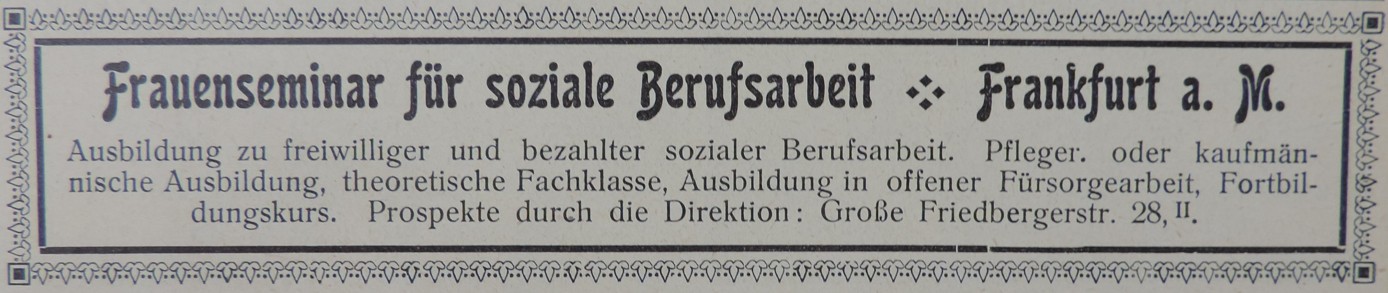 Frauenseminar für Soziale Berufsarbeit Frankfurt/Main